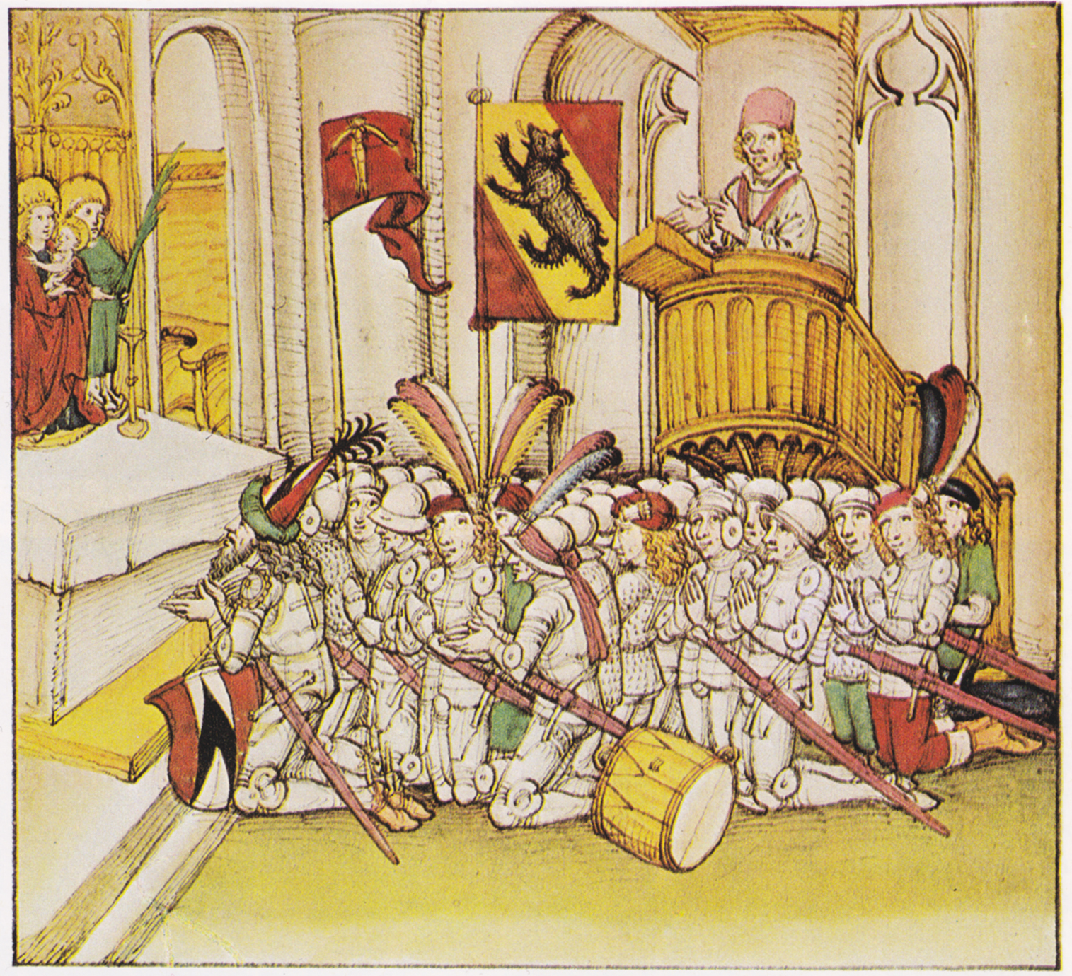 Gebet und Predigt der Berner und ihrer Verbündeter vor dem Auszug in die Schlacht bei Laupen 1339. Vor dem Altar der Hauptmann Ritter Rudolf von Erlach, erkennbar am Wappen der Familie von Erlach. Über der Gruppe das Berner Banner und das sog. Schützenfähnlein. Die Krieger tragen zum ersten Mal das weisse Kreuz aus zwei Leinwandstreifen als gemeinsames Erkennungszeichen der Eidgenossen.